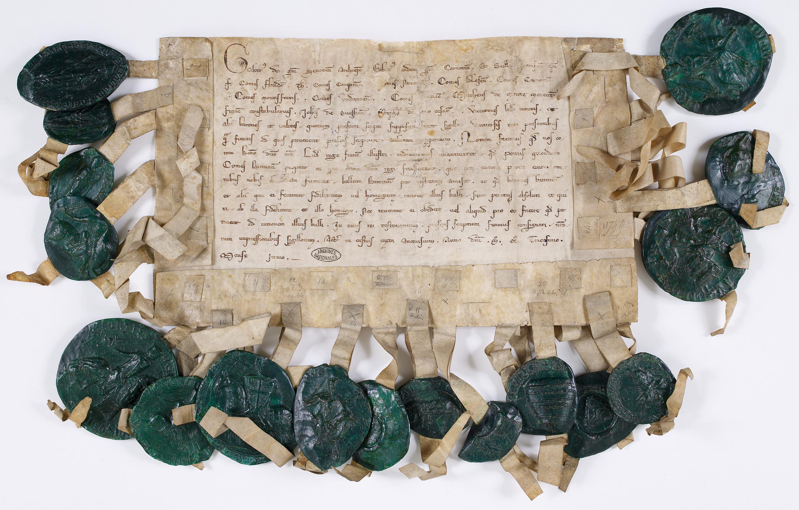 Déclaration de forfaiture rendue par les barons français contre le Comte de Bretagne Pierre Mauclerc. Au camp devant Ancenis, juin 1230